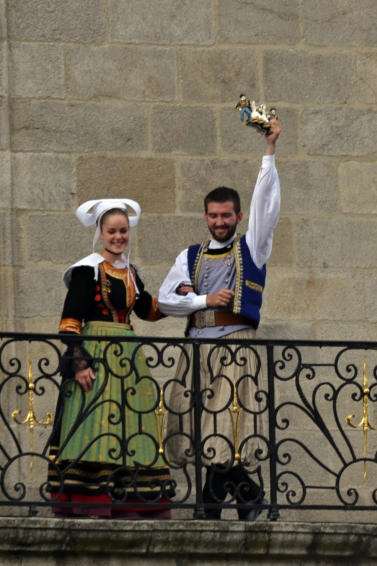 Annonce des résultats du trophée Gradlon puis de l'élection de la Reine de Cornouaille au balcon du Musée Départemental Breton lors du « Kemper en Fête » le dimanche 28 juillet 2013 dans le cadre du Festival de Cornouaille.